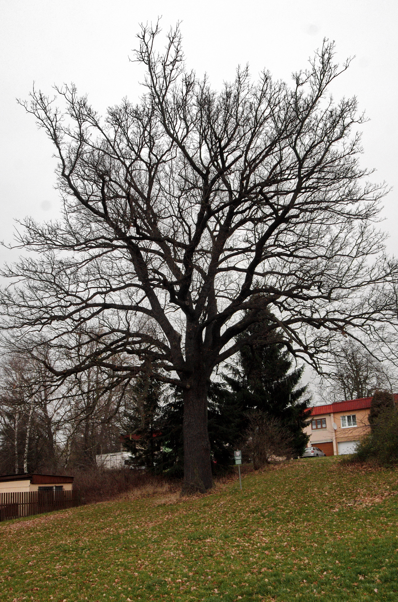 Památný strom Počerenský dub, Počerny (část města Karlovy Vary)